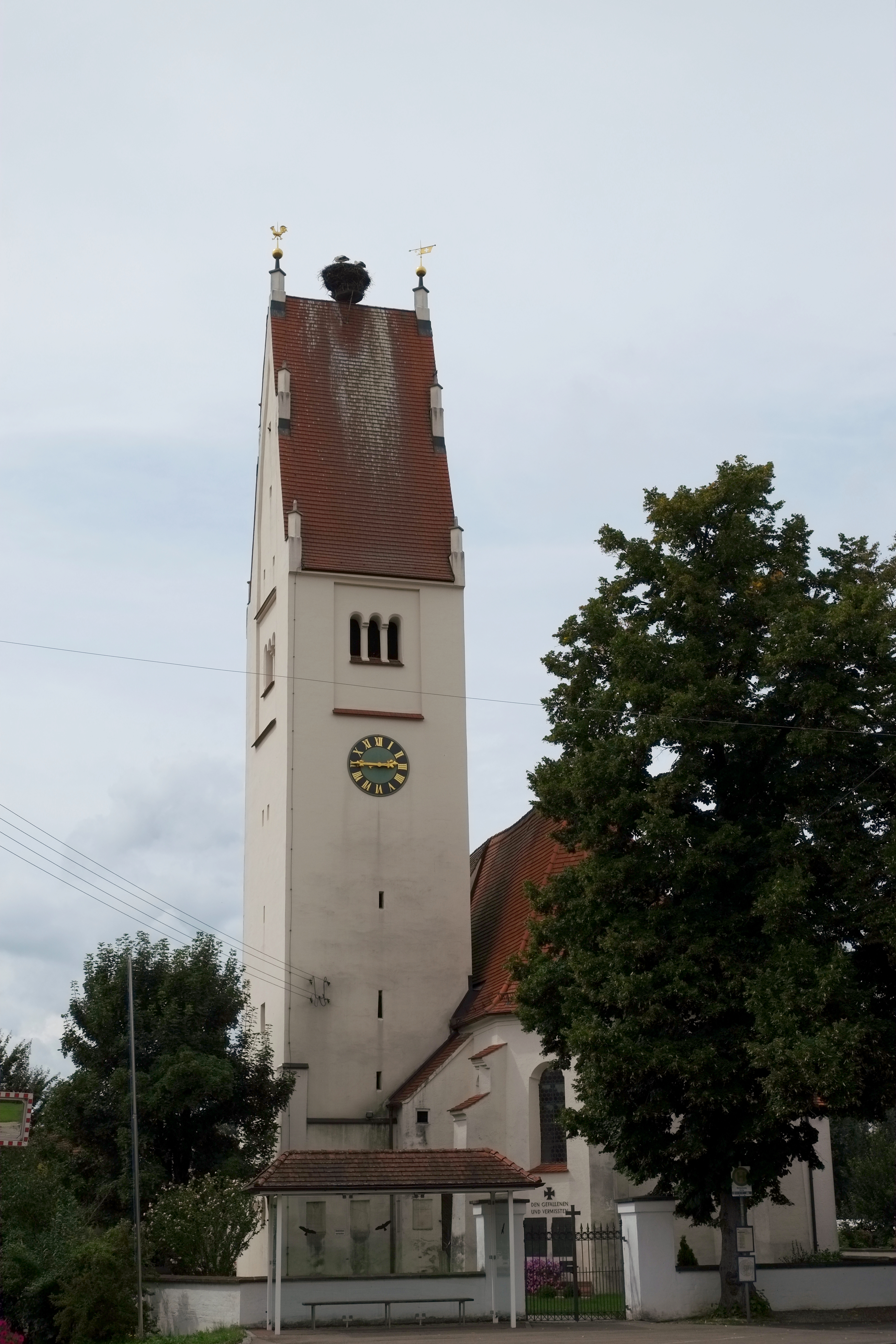 Katholische Pfarrkirche St. Michael in Wörleschwang im Landkreis Augsburg (Bayern, Deutschland)